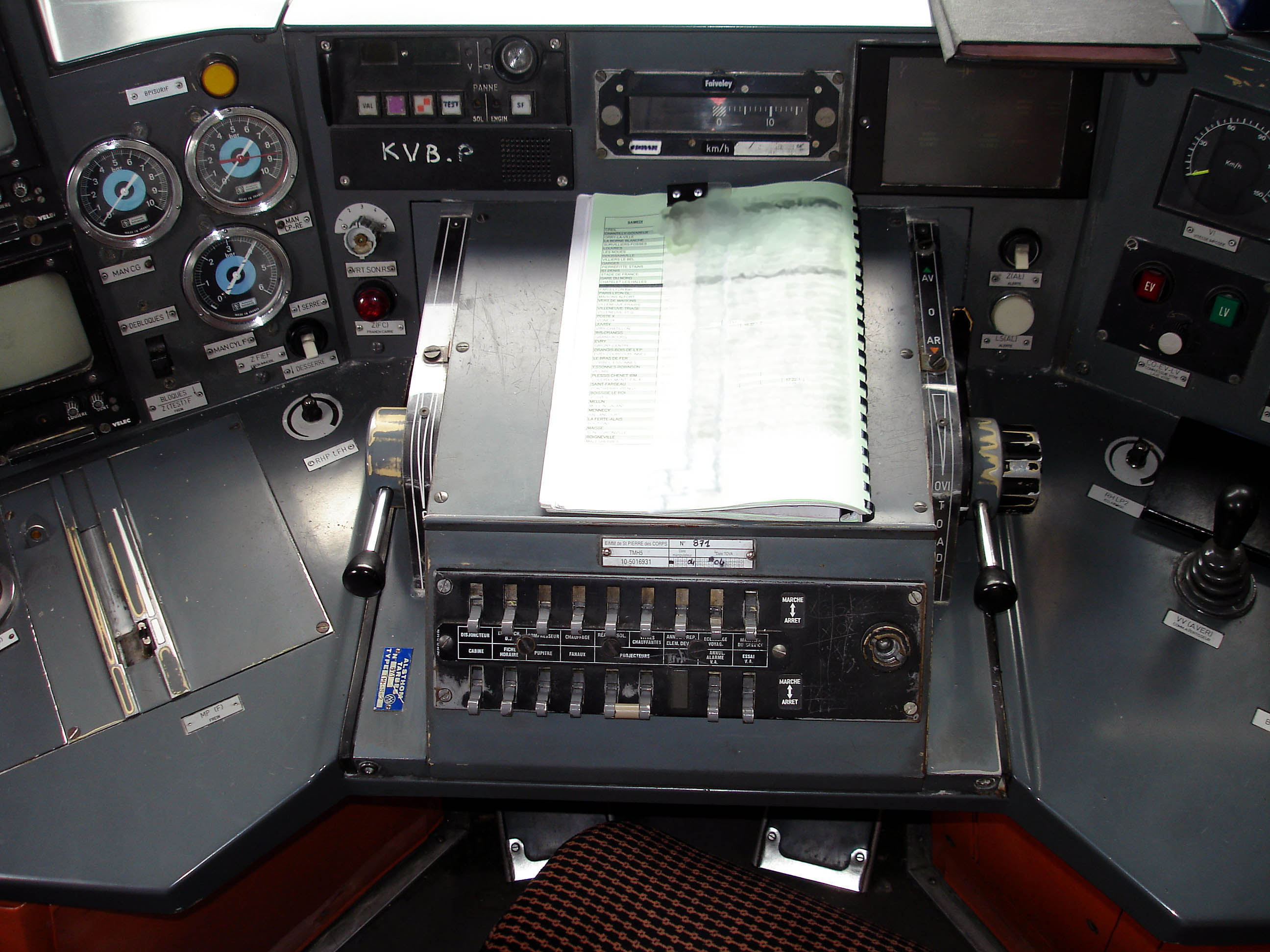 Pupitre de conduite d'une rame Z 20500. / Visualisateur KVB sur le côté gauche du pupitre central, à droite des trois cadrans.